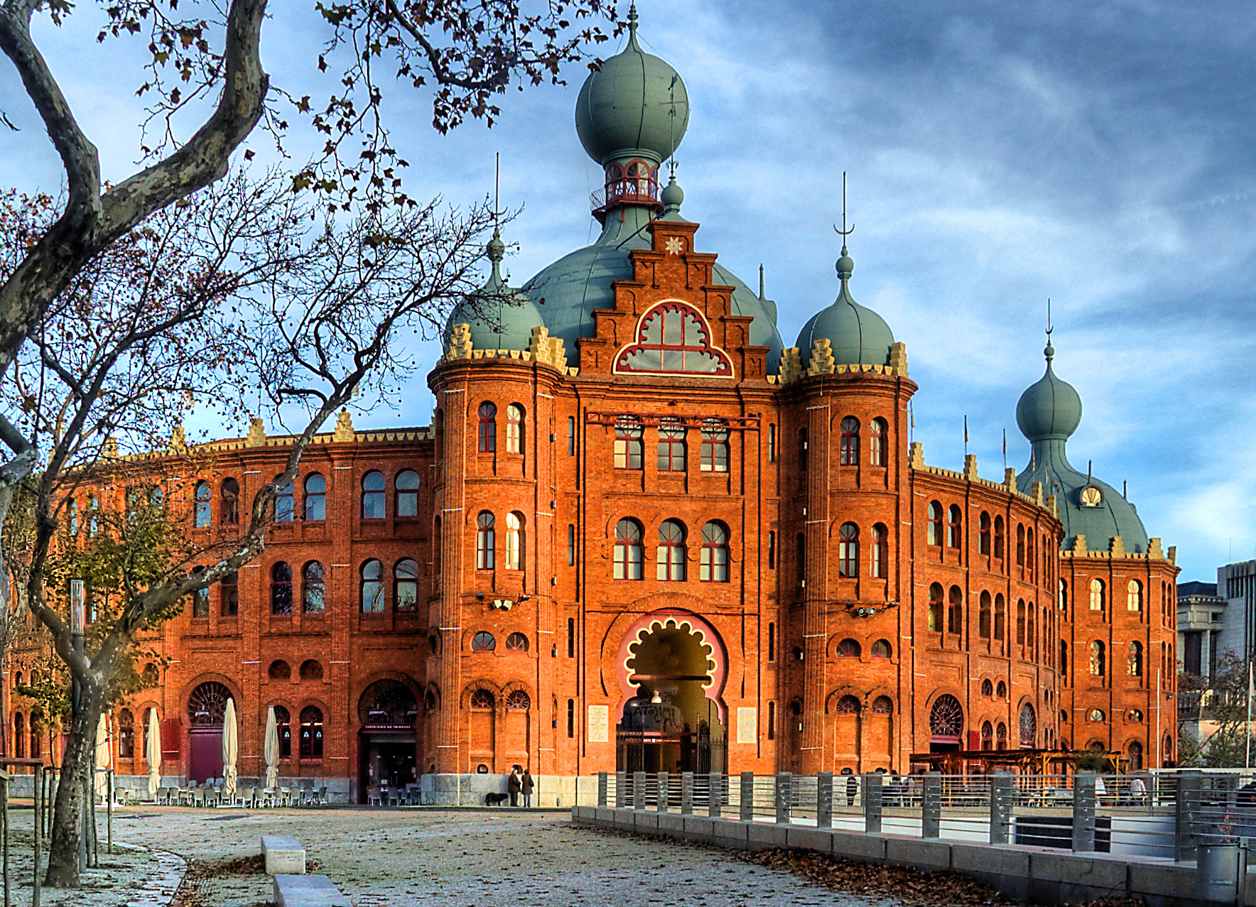 Praça de Touros do Campo Pequeno em Lisboa